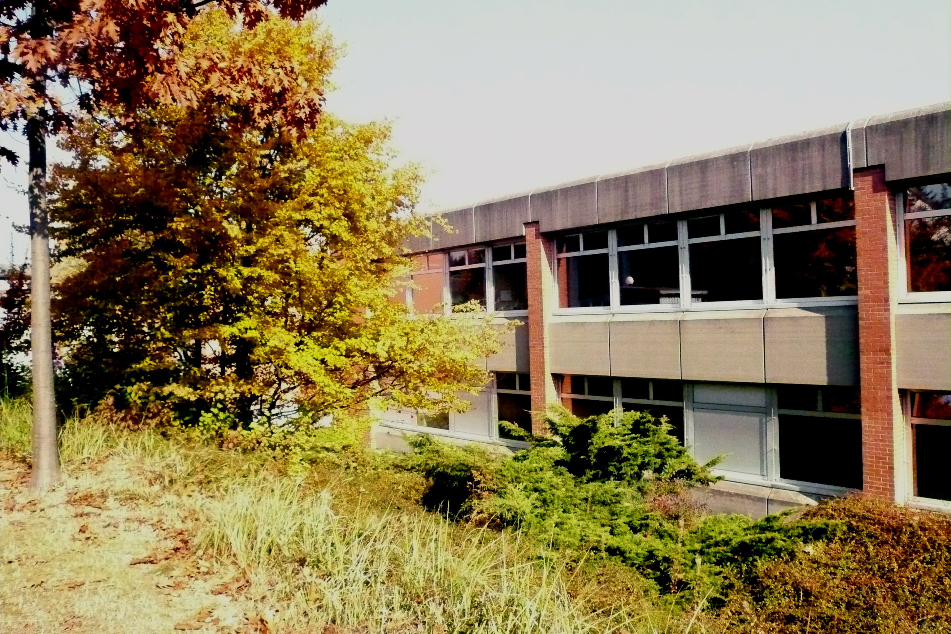 Der Biologie-, Chemie-, Physik- und Werktrakt